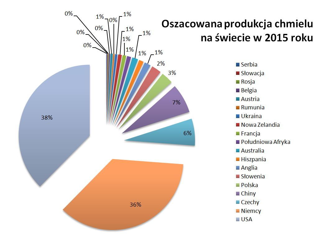 Wykres przedstawiający produkcję chmielu w 2015 roku na świecie